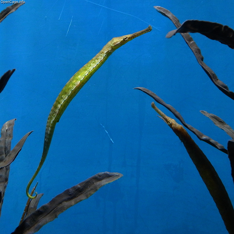 Syngnathoides biaculeatus en el Acuario Público del Puerto de Nagoya, Japón